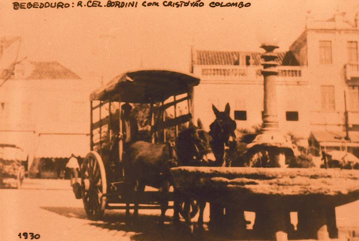 Um bebedouro para cavalos localizado na Avenida Cristóvão Colombo, esquina com a Rua Coronel Bordini (atualmente bairro Auxiliadora), no ano de 1930.